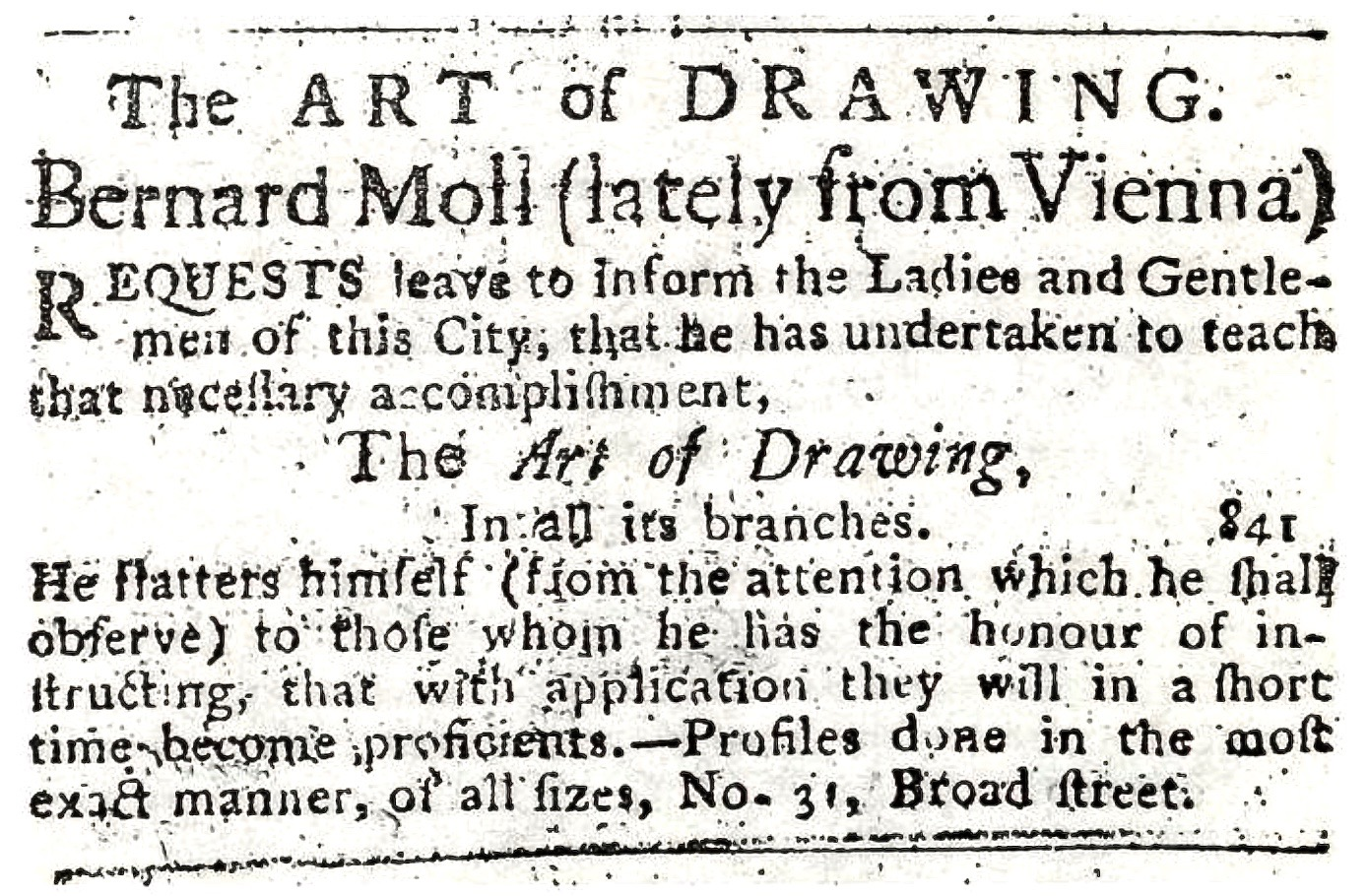 Inserat des Malers Bernhard Albrecht Moll (1743–1788) in: South Carolina State Gazette and General Advertiser, 23. November 1784.